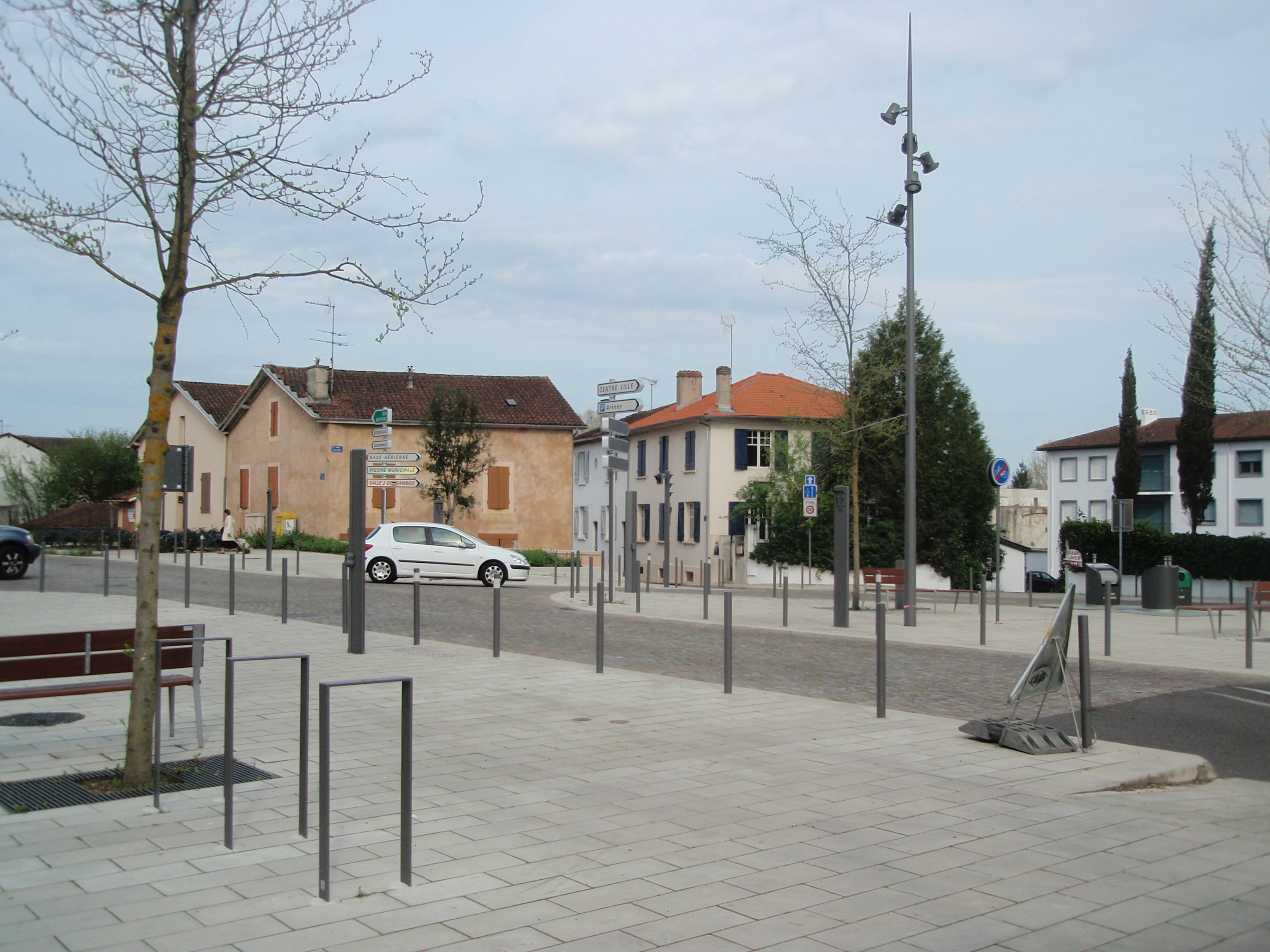 Place Saint-Louis réaménagée à Mont-de-Marsan (40)